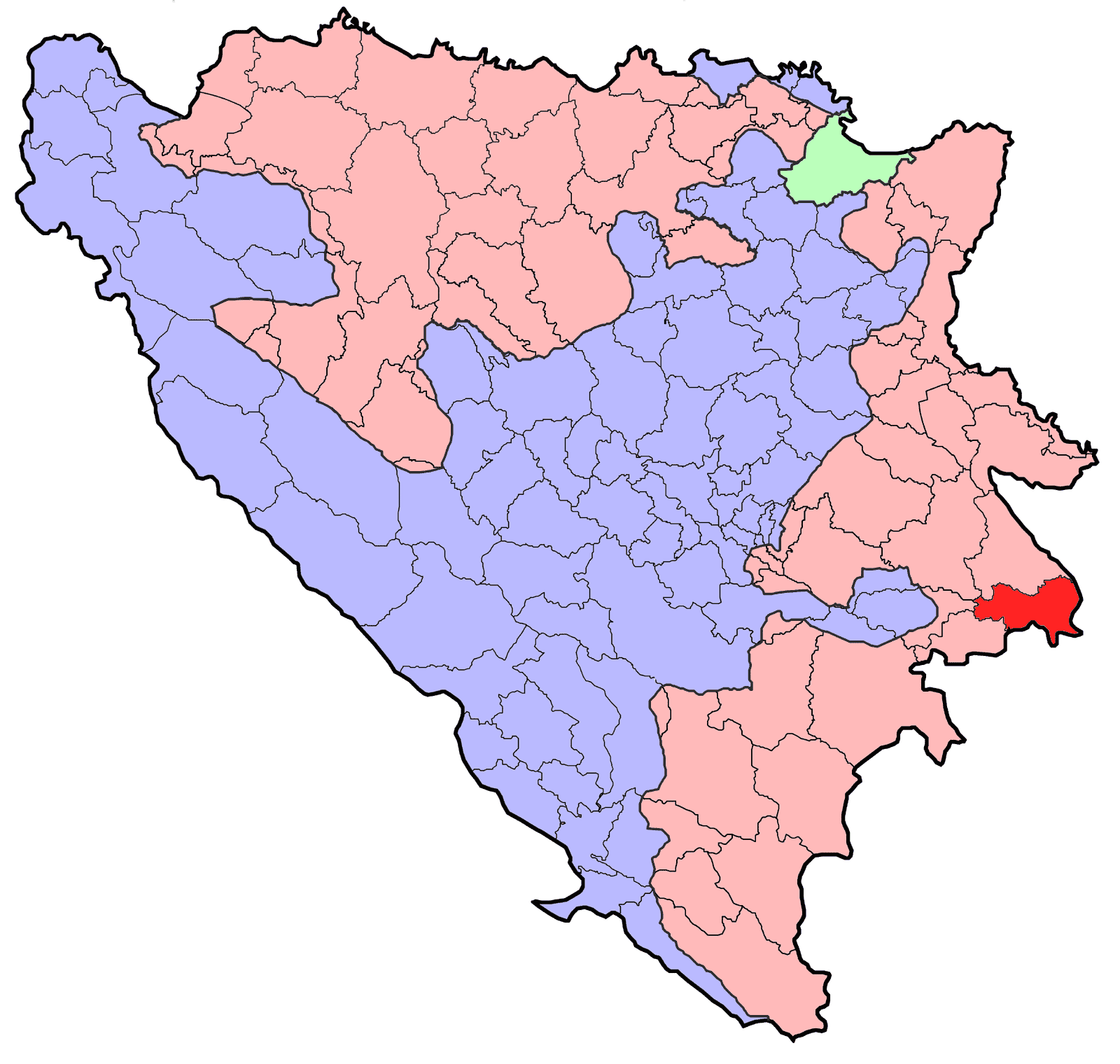 Republika Srpska (BiH) municipality